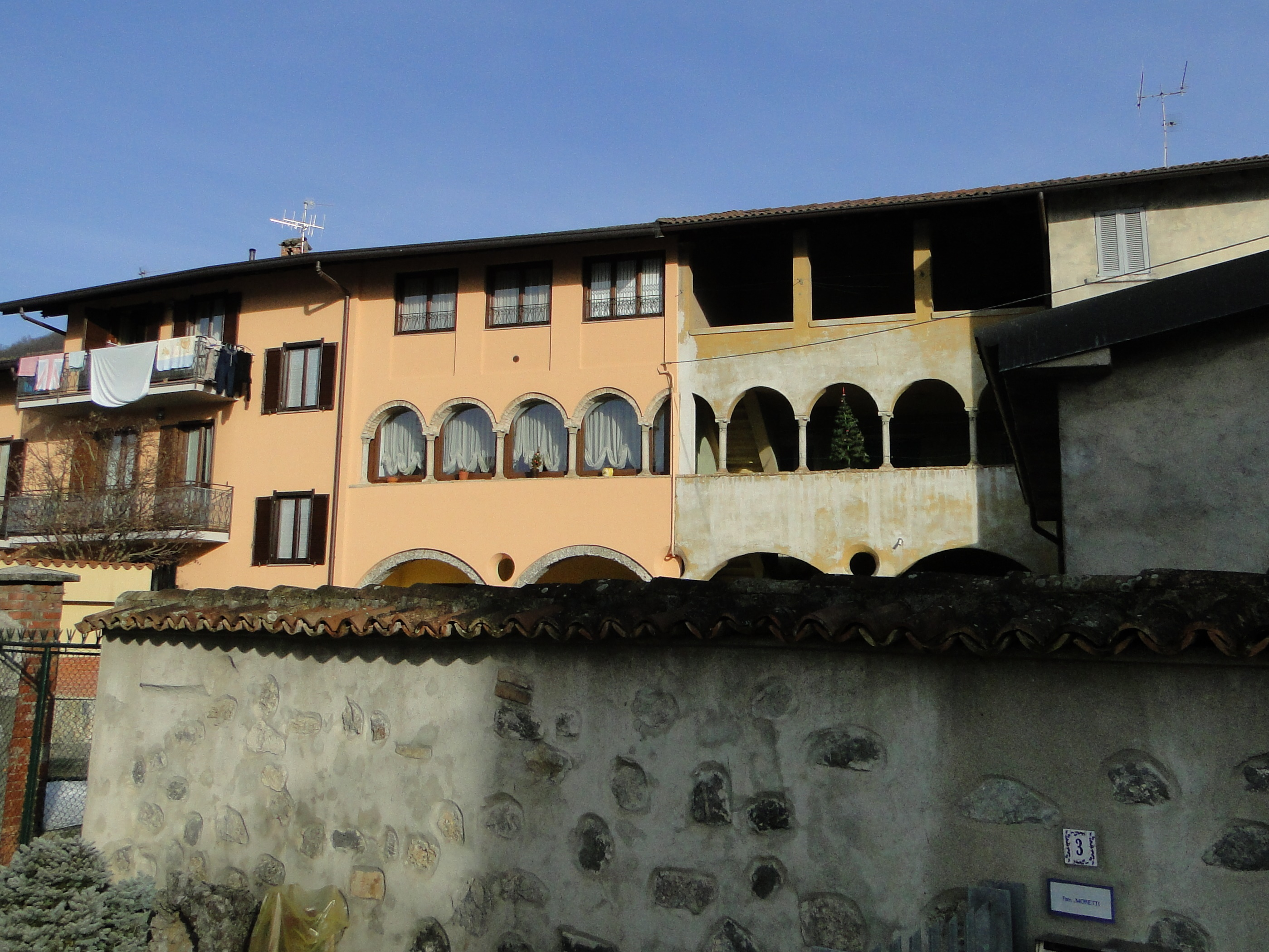 Casa natale dei conti Greppi. Cazzano Sant'Andrea (BG). Italy